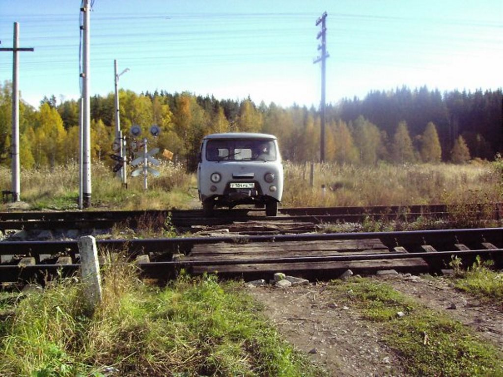 Ояярви